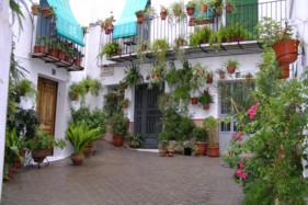 Plaza del Albaicin